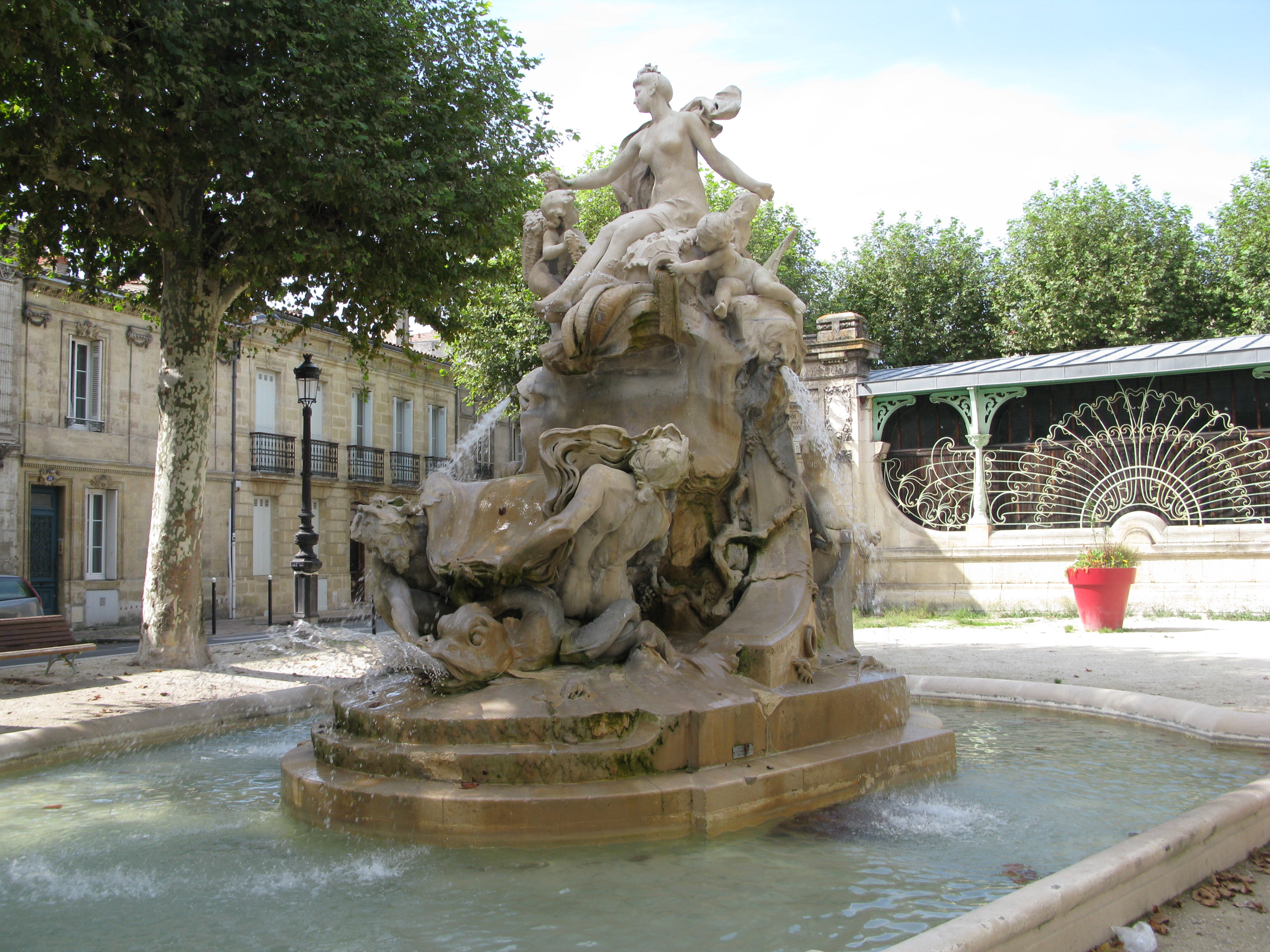 Vue droite de la fontaine centrale de la place Amédée-Larrieu